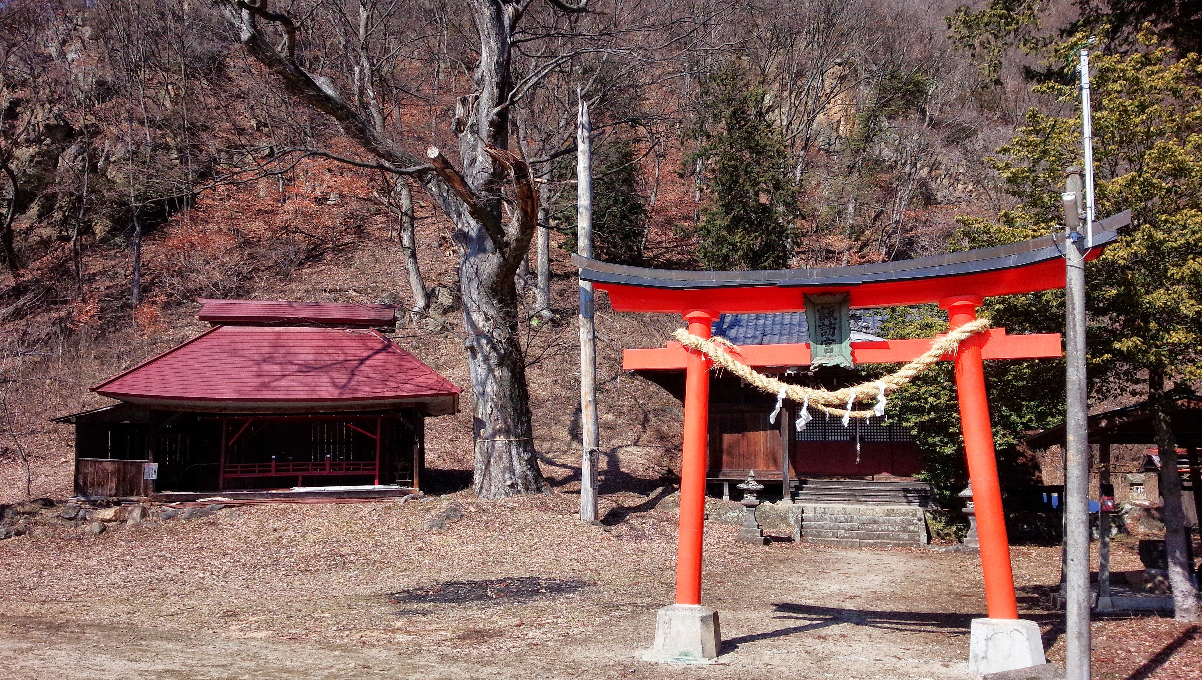 長野県上田市丸子腰越の一本木諏訪神社